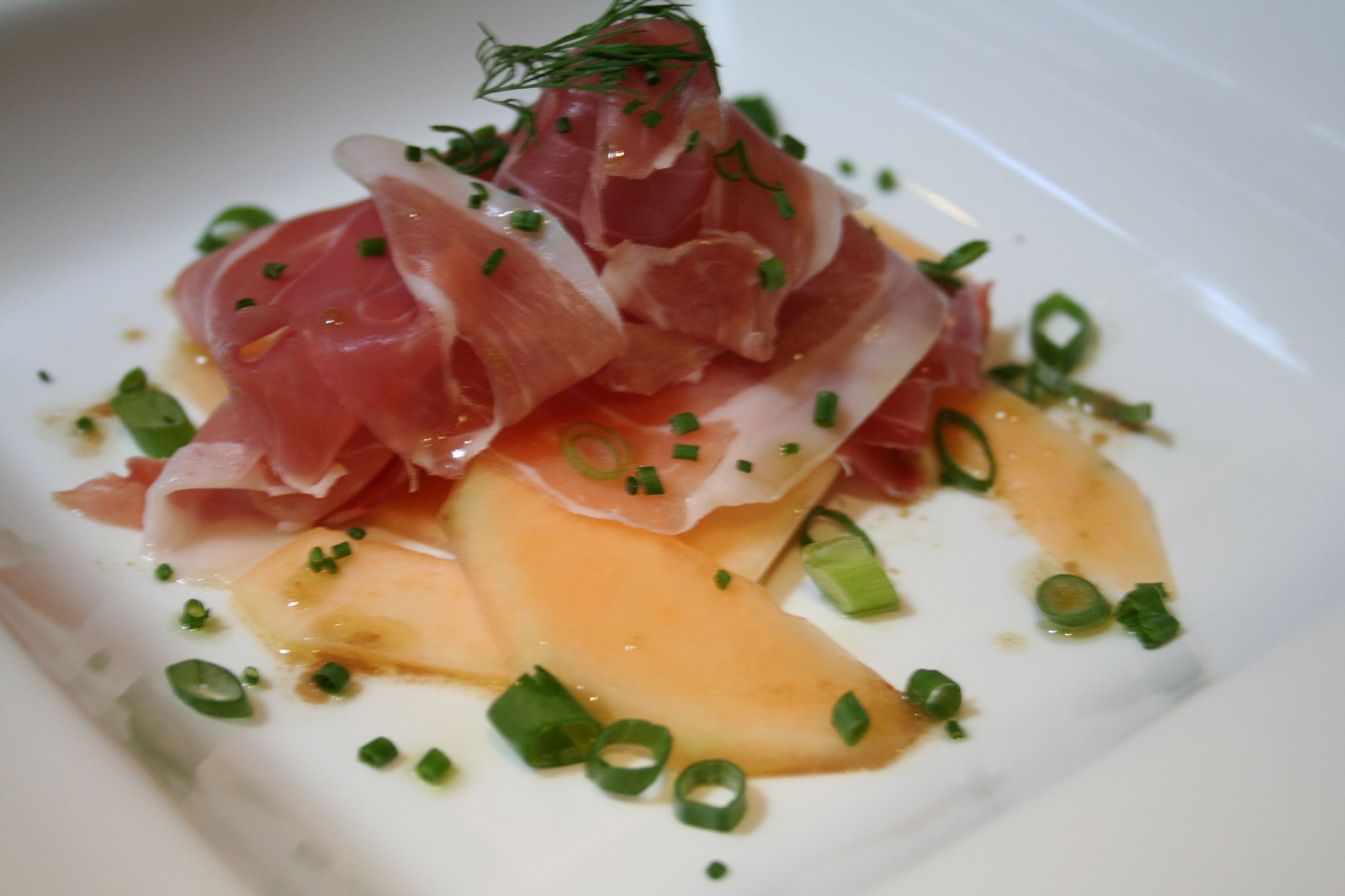 Prosciutto di Parma e melone Parma ham and cantaloupe